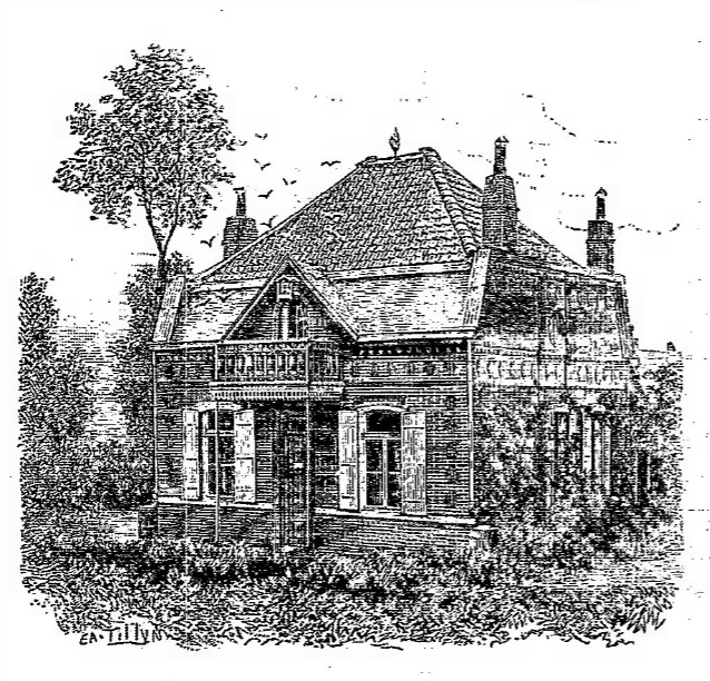 Maison de Jean Desbouvrie avec son Hirondellier.